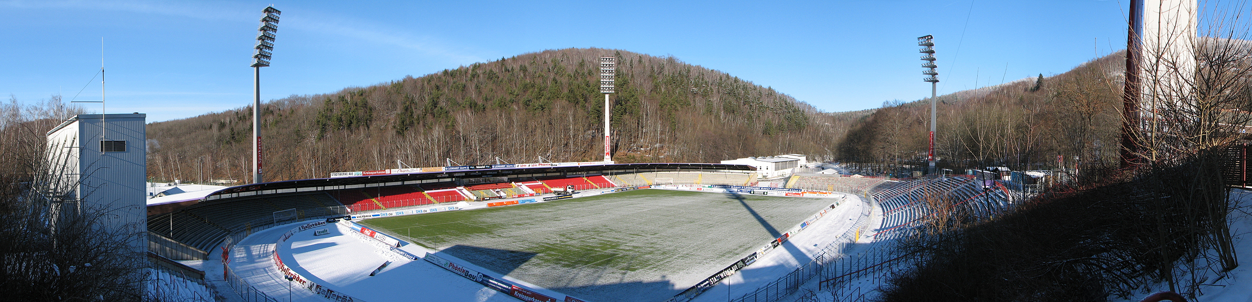 Das Erzgebirgsstadion aus Block A/B.